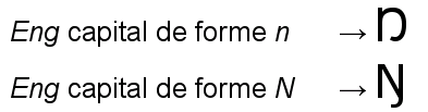 Formes de la lettre eng en capitale. Vincent Ramos